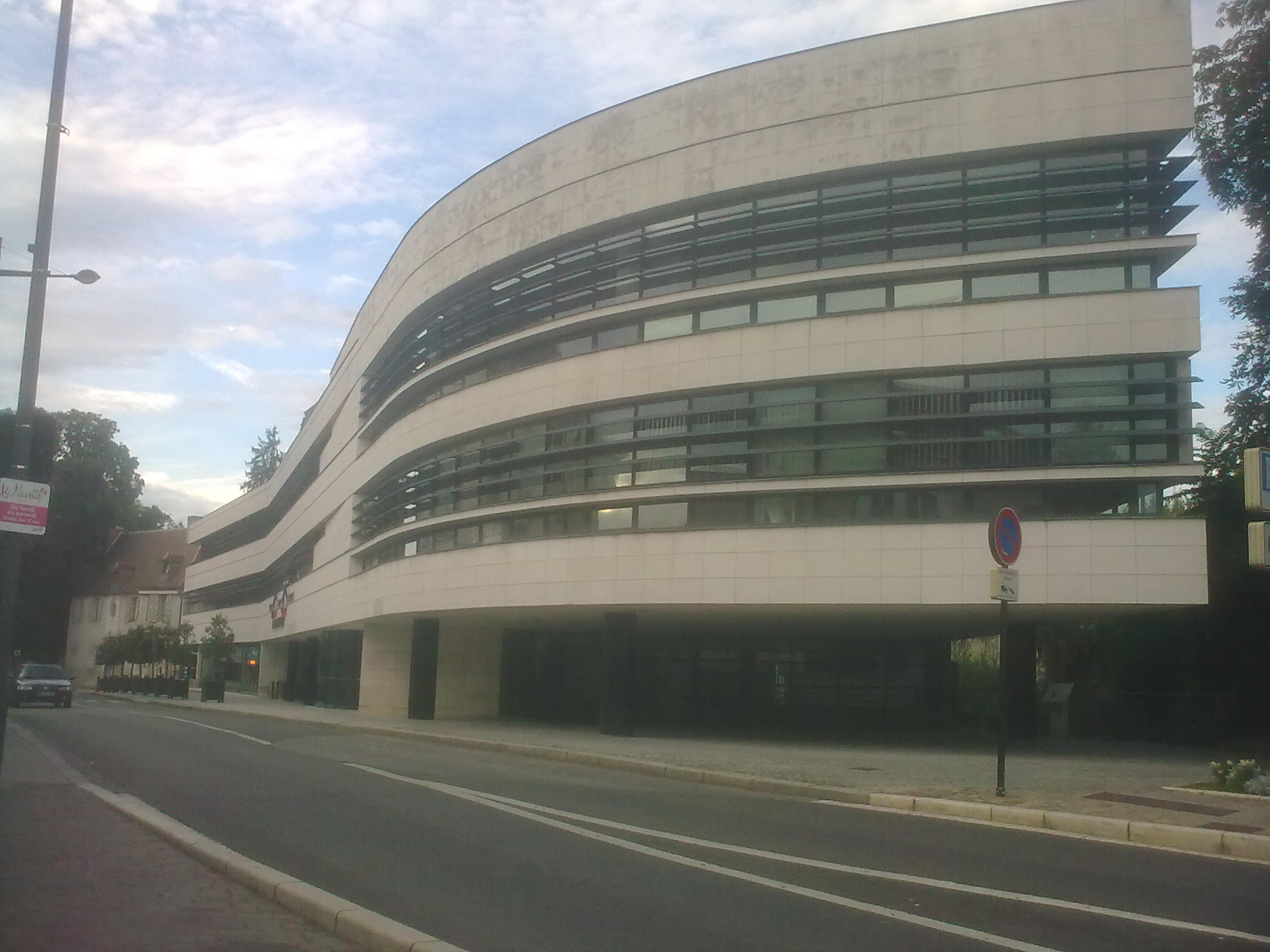 Nouvel Hôtel de Ville de Bourges , en fonction depuis 1995, et remplacant / complétant le palais archiépiscopal , puis plus anciennement le Palais jacques Coeur et l' Hôtel des Echevins , qui ont abrité successivement le Conseil de la ville depuis le moyen âge.